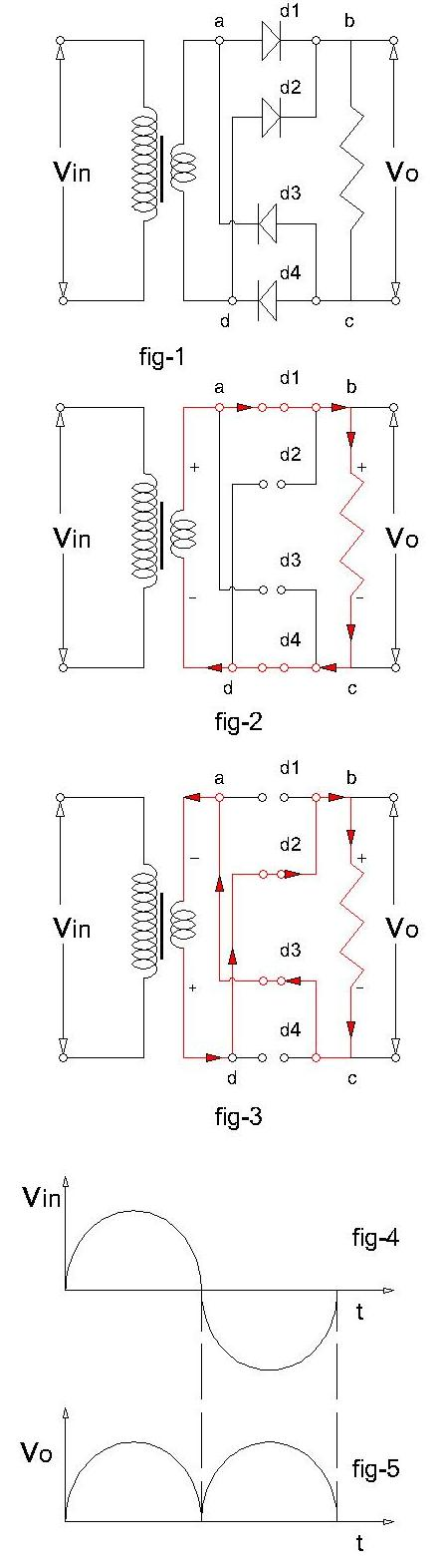 fullwave rectifier